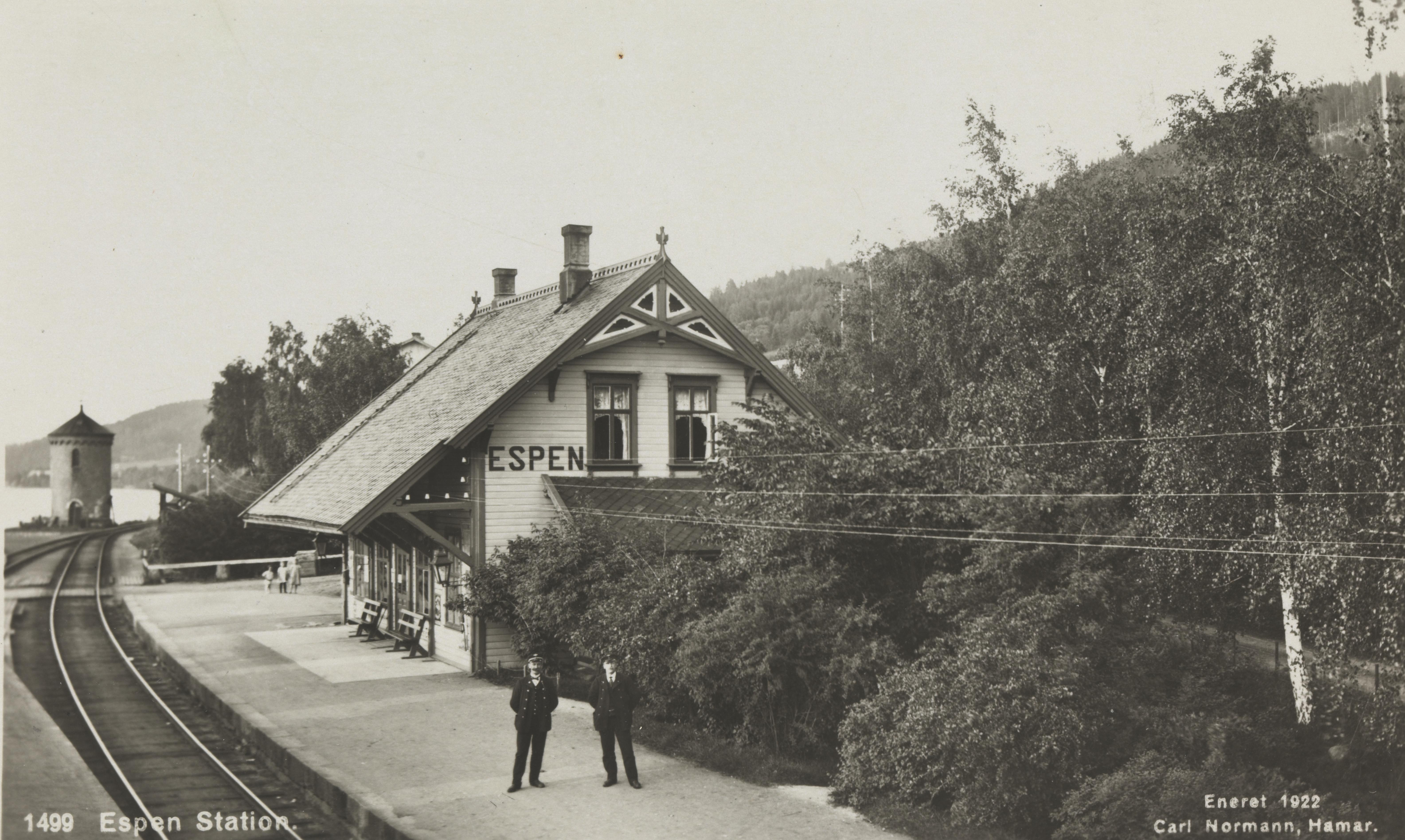 Bildet er hentet fra Nasjonalbibliotekets bildesamling Espa,Espa stasjon, Stange, Hedmark